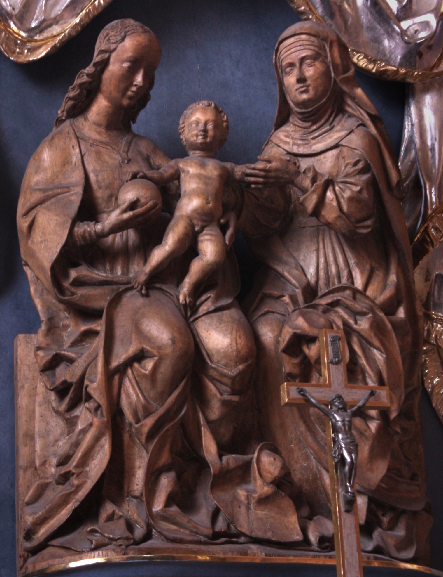 Wit Stwosz - Święta Anna i Maria z Dzieciątkiem Jezus, Veit Stoß - St. Anna und Muttergottes mit Jesus